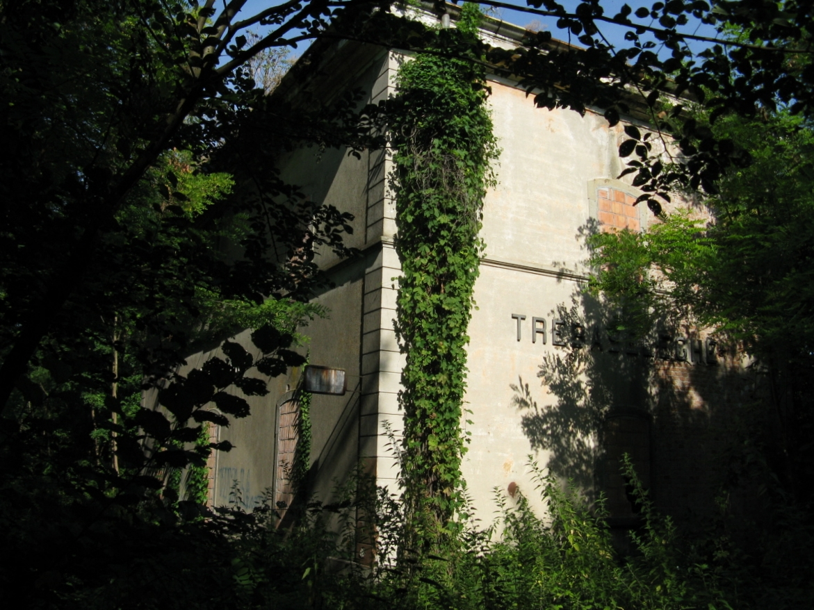 La vecchia stazione di Trebaseleghe, avvolta dalla boscaglia